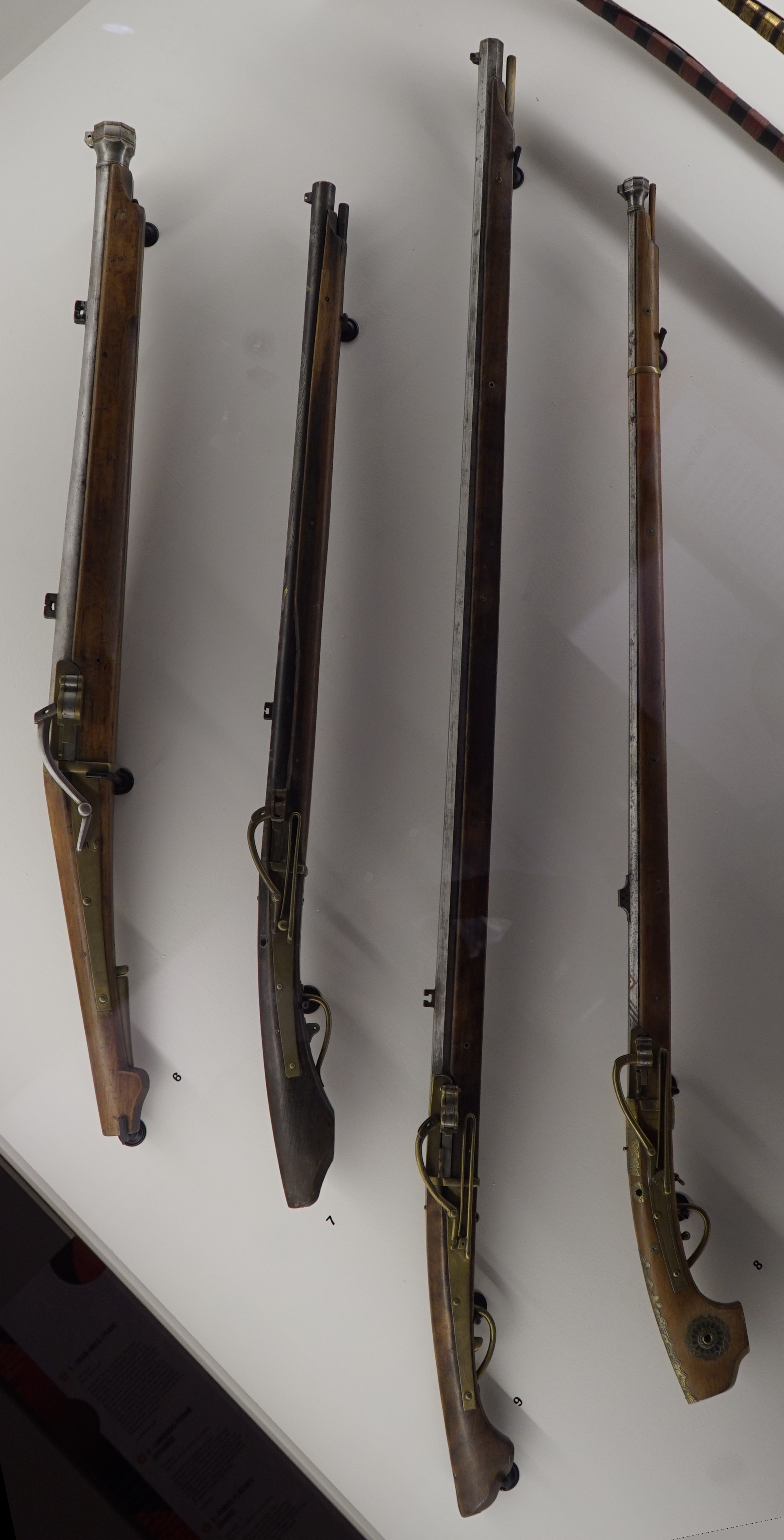 objets achetés au japon par A. Gérard.